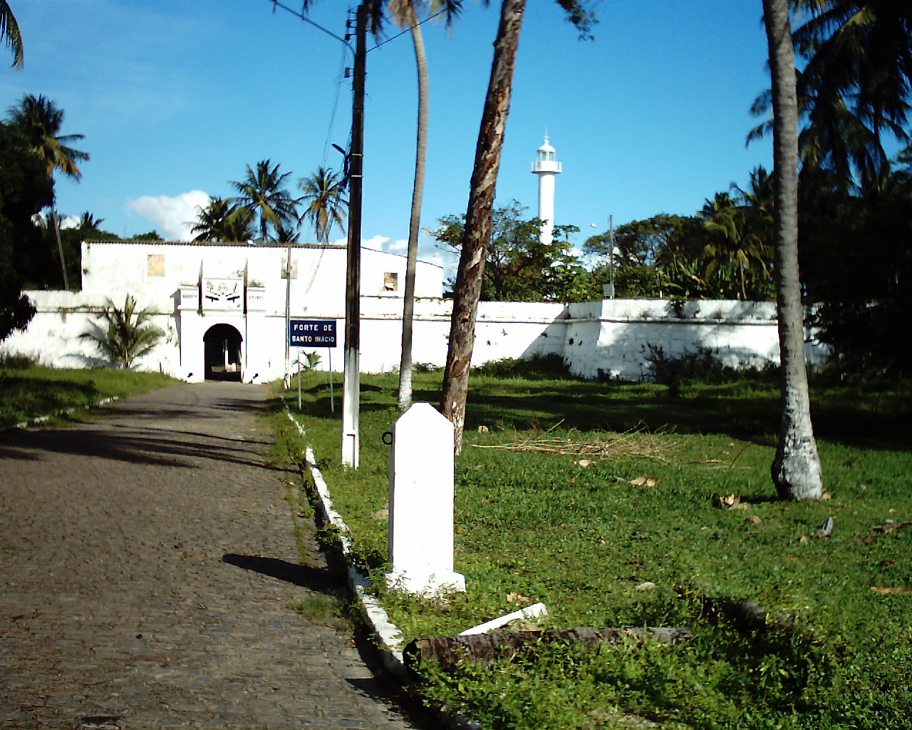 Entrada do Forte de Santo Inácio de Tamandaré.